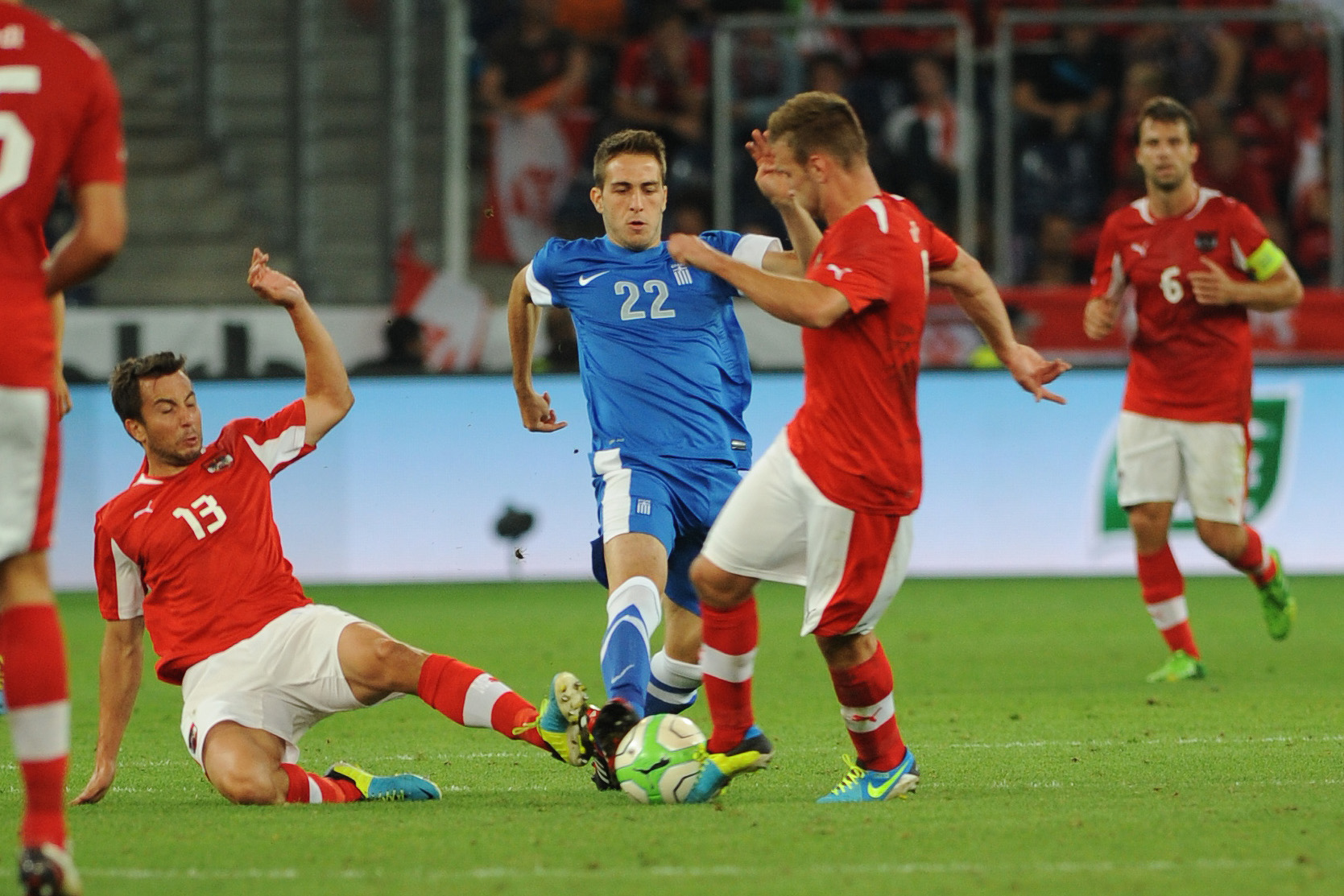 Freundschaftliches Länderspiel Österreich - Griechenland am 14. August 2013 in Salzburg: Kostas Fortounis